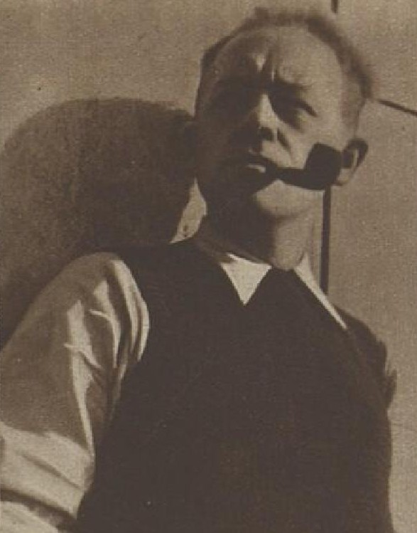 Géza Včelička (1901-1966), český levicový novinář, reportér, spisovatel (básník i prozaik), cestovatel, trampský organizátor a malíř